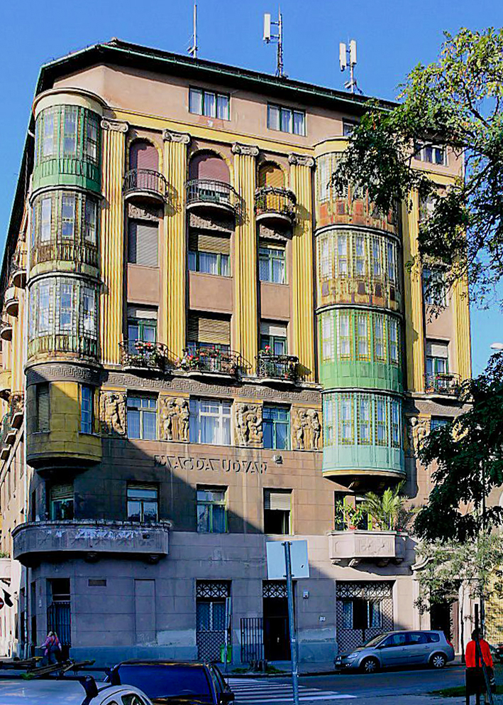 A Magda-udvar a Mátyás-téren. Ez volt az egyik helyszíne 2012 nyarán a Liza, a rókatündér című film forgatásának.